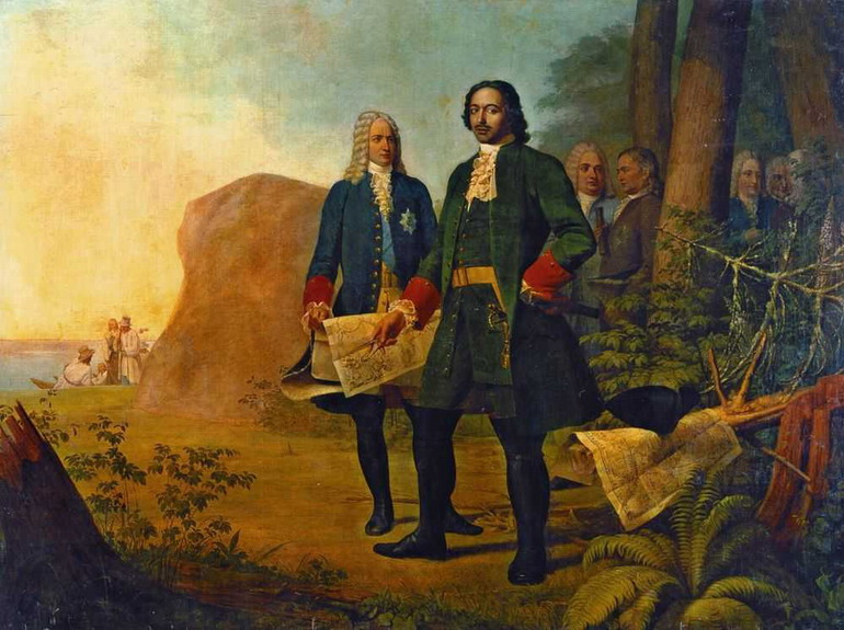 Петр Великий. Основание Санкт-Петербурга. 1838